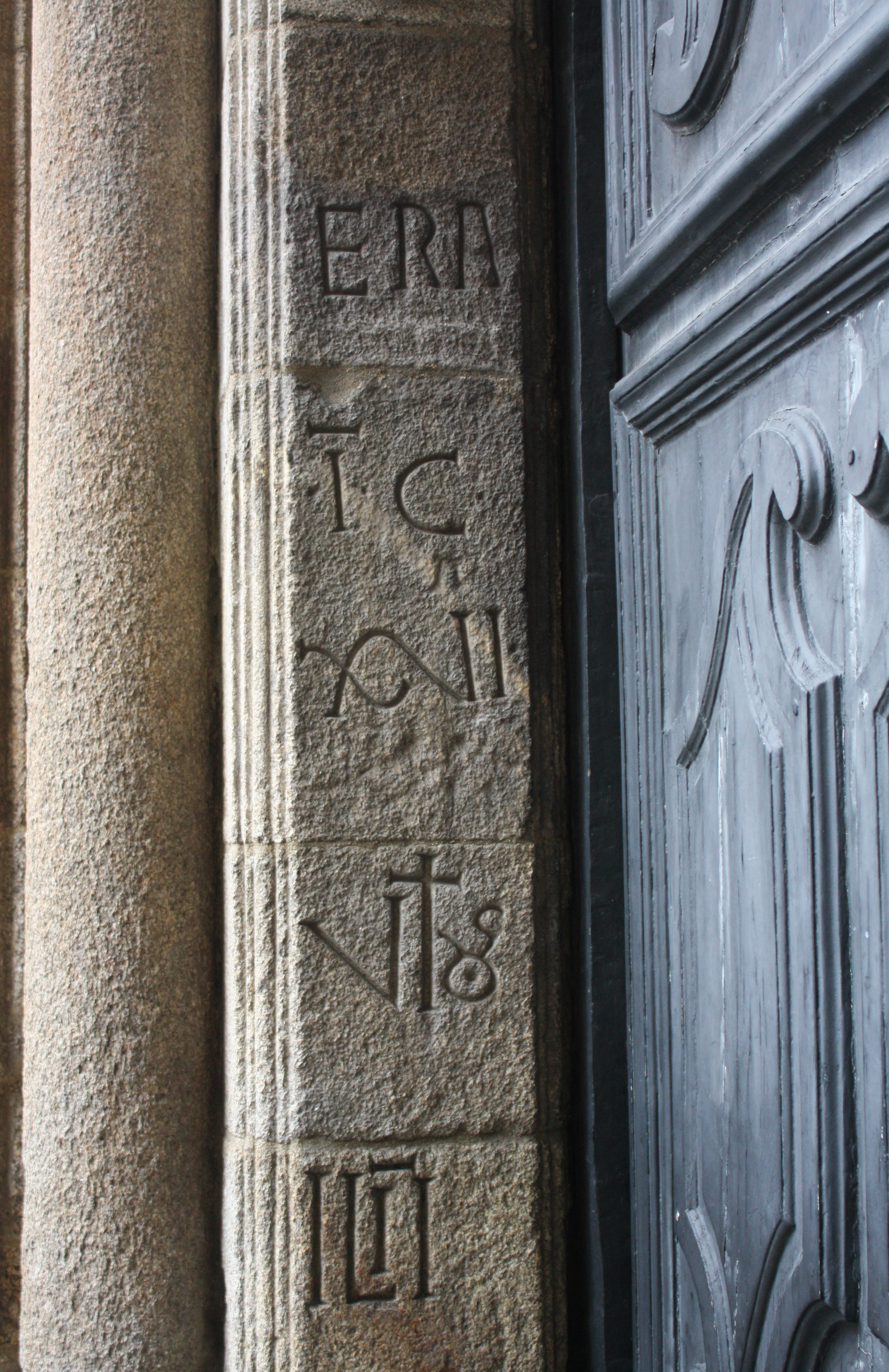 Inscrición nunha das xambas da fachada das Praterías, na que se constata o 11 de xullo de 1076 como data de comezo das obras.